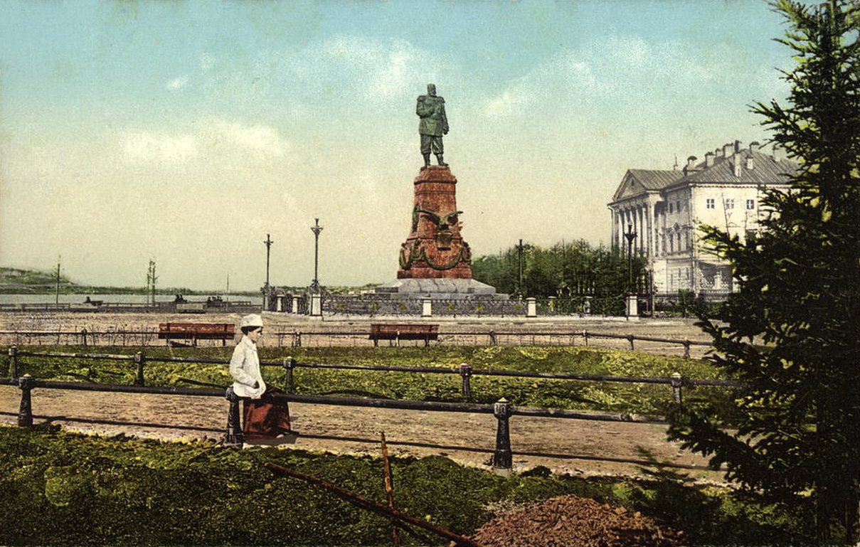 Александровский сад г Иркуск архитектор В А Рассушин